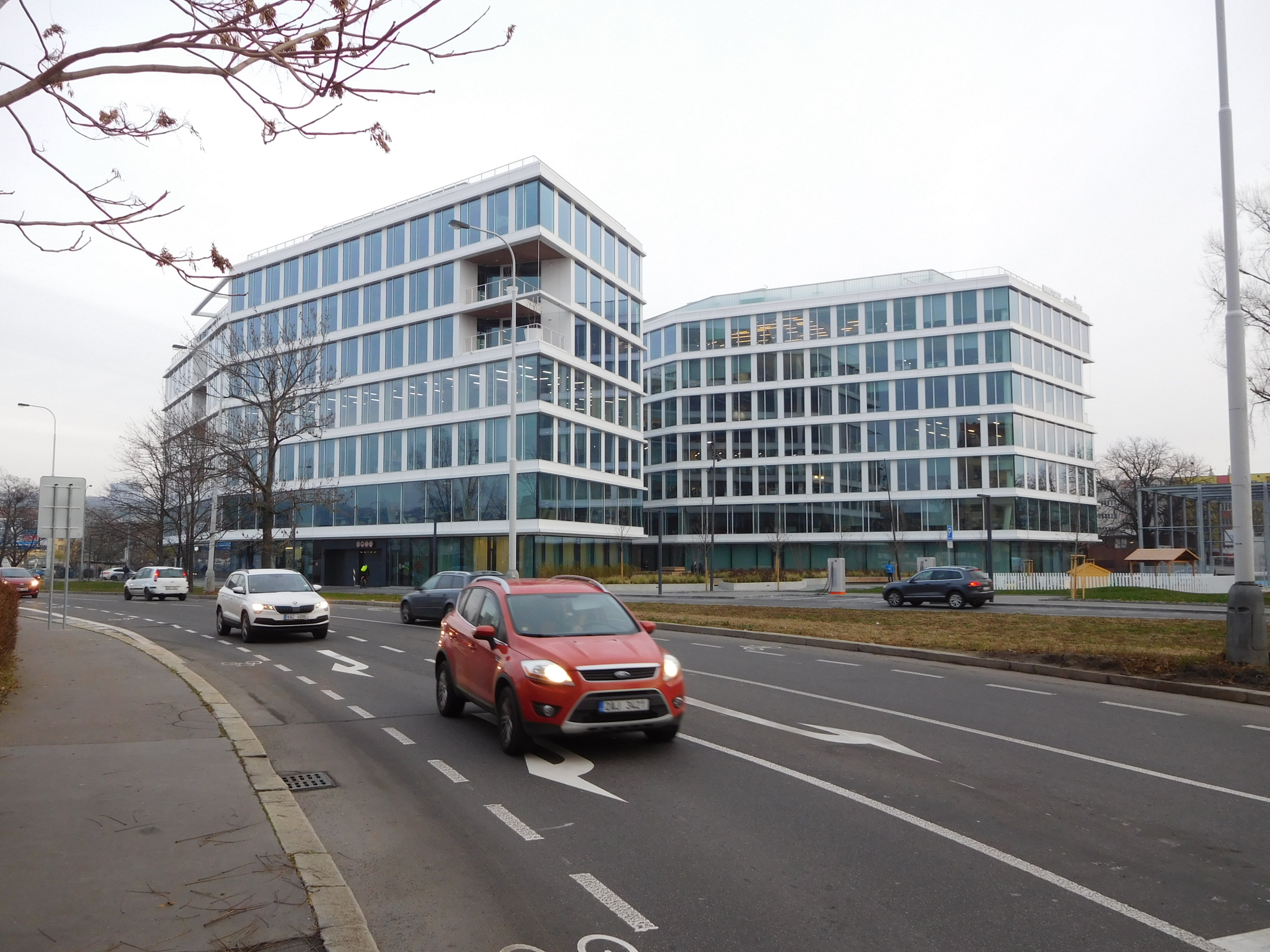 Praha - Holešovice, Železničářů, Visionary